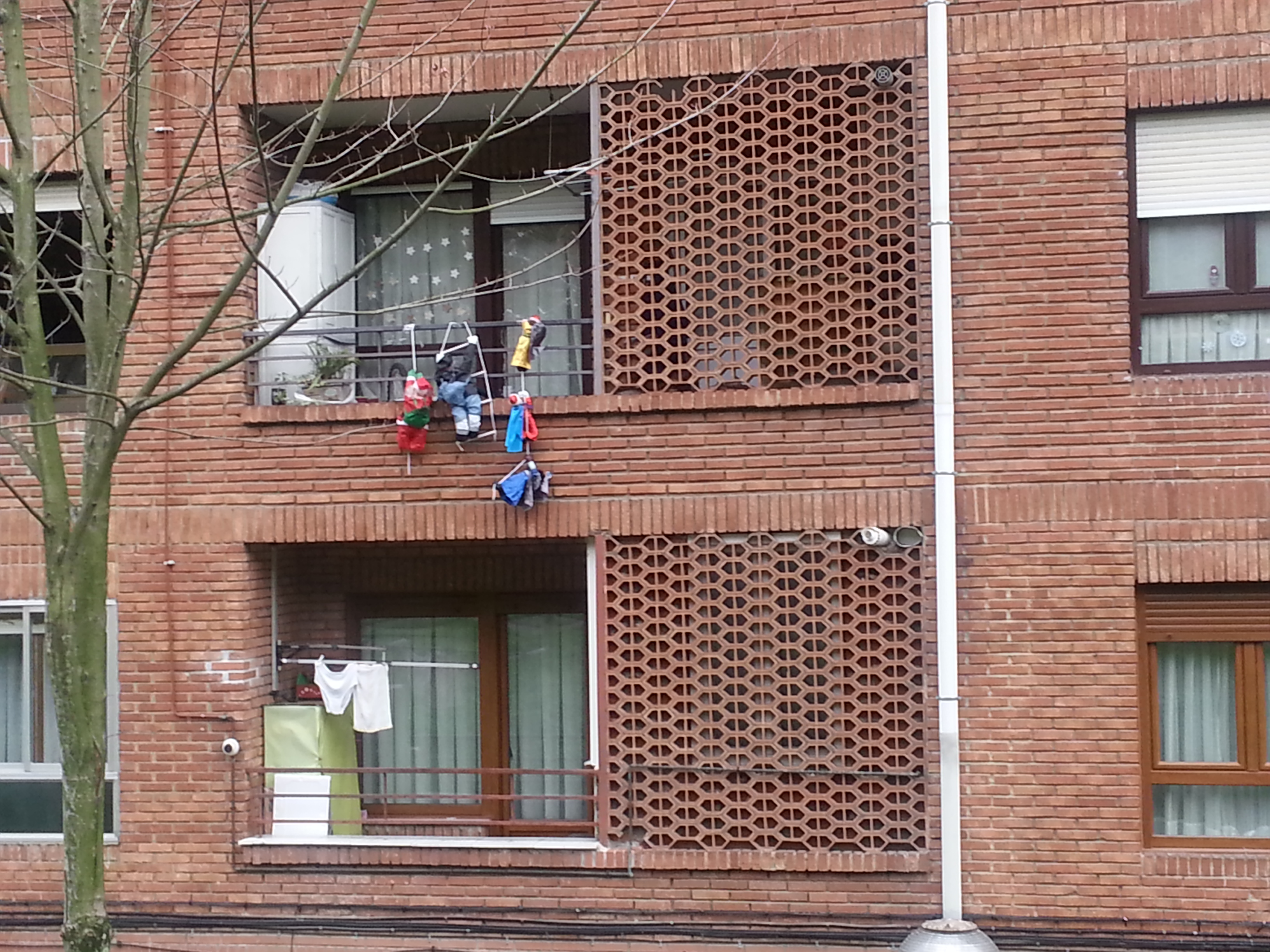 Olentzero, Sta. Claus eta Hiru Erregeak - Bilboko San Inazio auzoko balkoi batean 2018ko abenduan